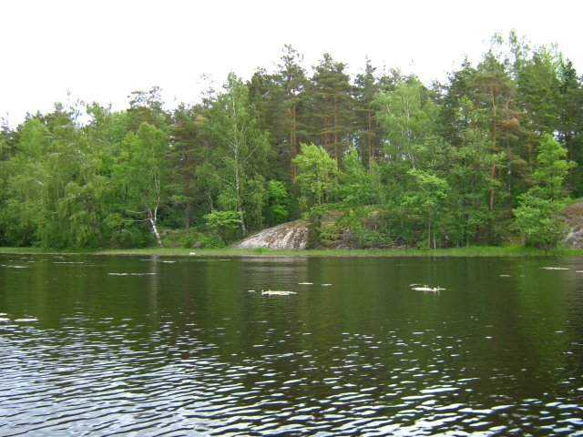 Melnikovo, Leningrad oblast, Priozersk region. Vuoksa